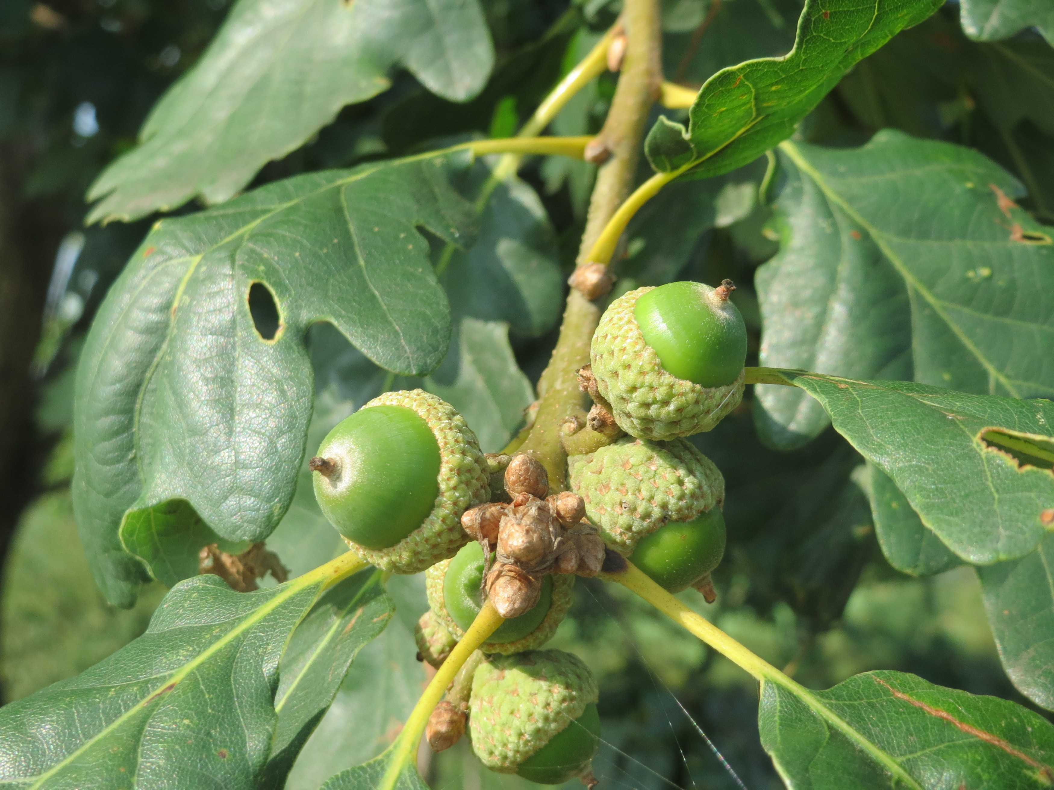 Traubeneiche (Quercus petraea) bei Schalkenmehren